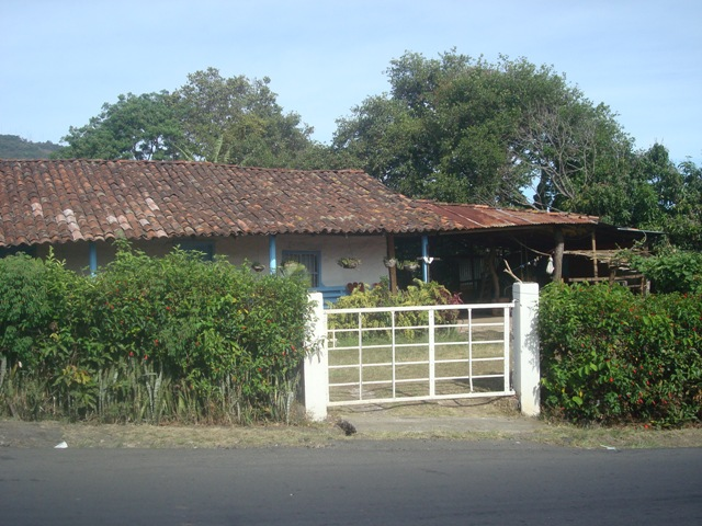 Casa de adobe en San Antonio de Escazú, Costa Rica. En ella se pueden apreciar las paredes encaladas, el techo de teja y el trapiche.